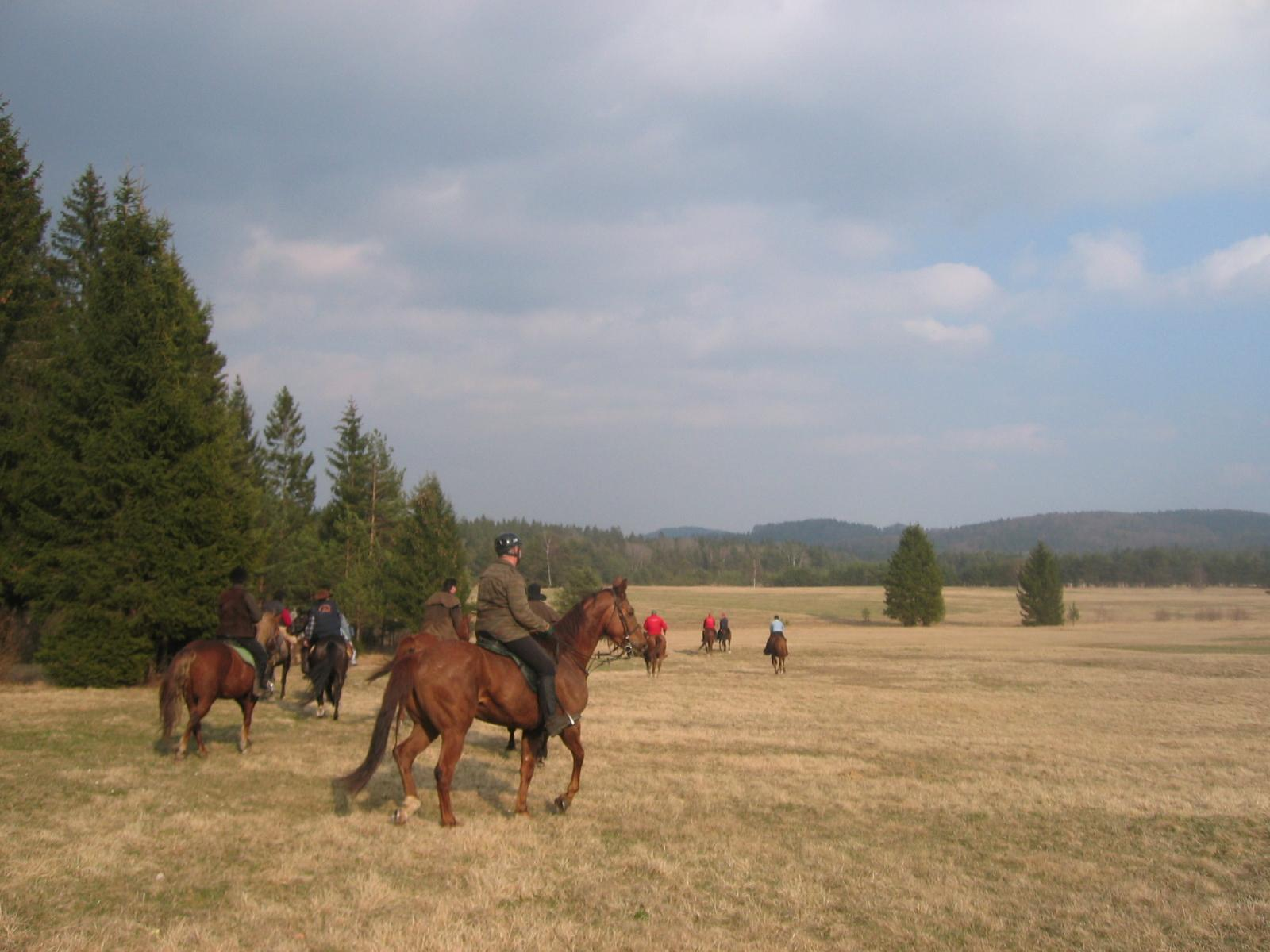 Bloška planota (Bloke plateau), Slovenia photo:Ziga 16:22, 29 March 2007 (UTC)